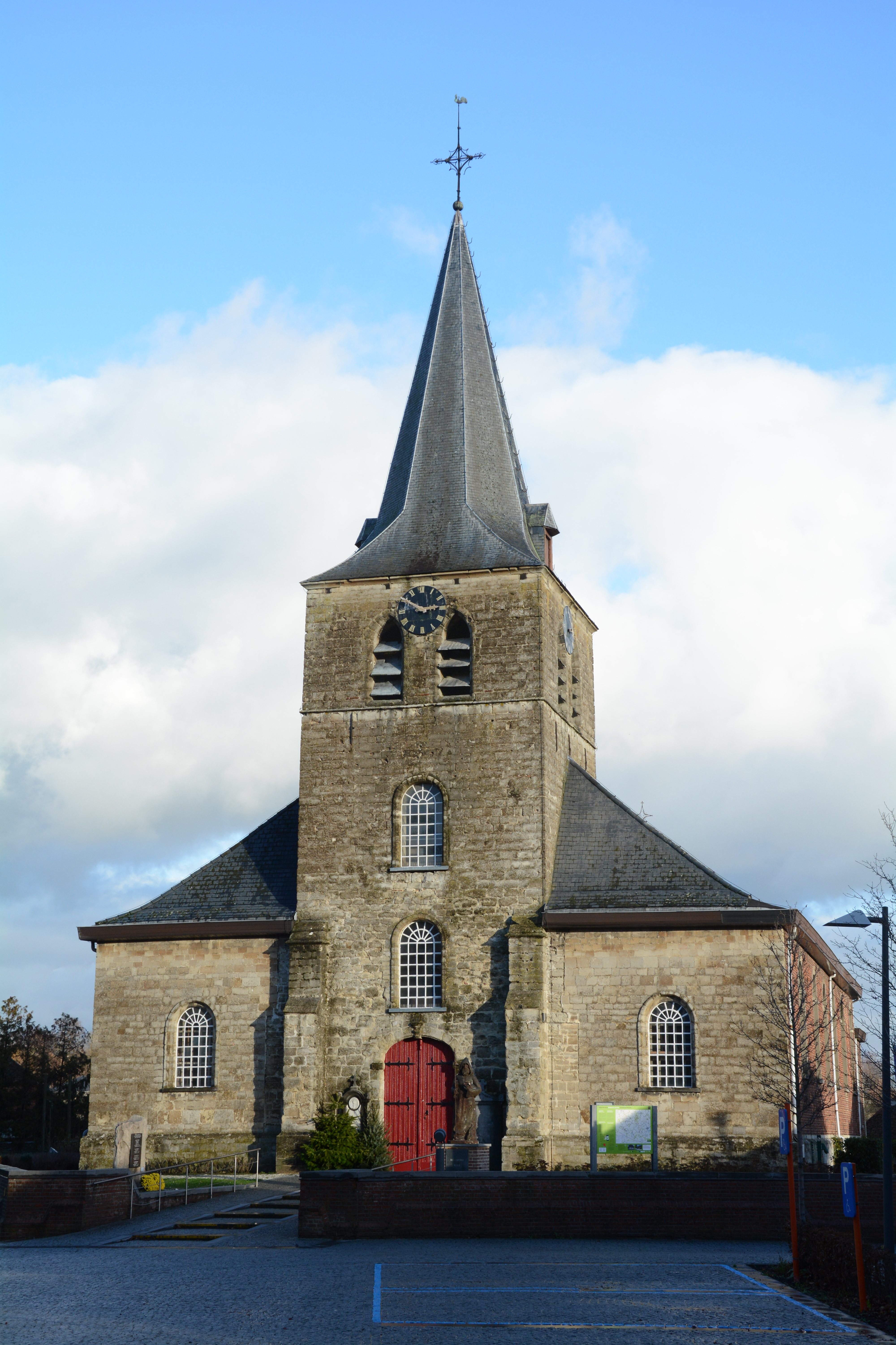 Parochiekerk Onze-Lieve-Vrouw (Essene)